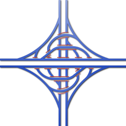 Een schema van een turbineknooppunt, gemaakt door mezelf.